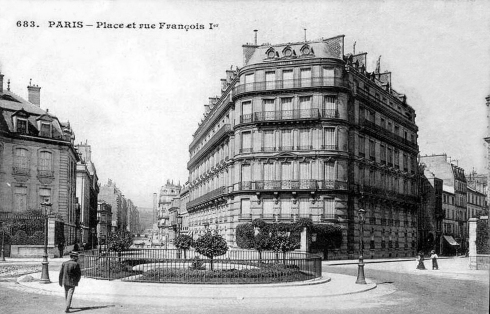 Place François Ier avant 1909 donc avant la pose de la fontaine en provenance de la place de la Madeleine.Unknown place françois ier before 1909 so before installation of fountain of place de la madeleine.